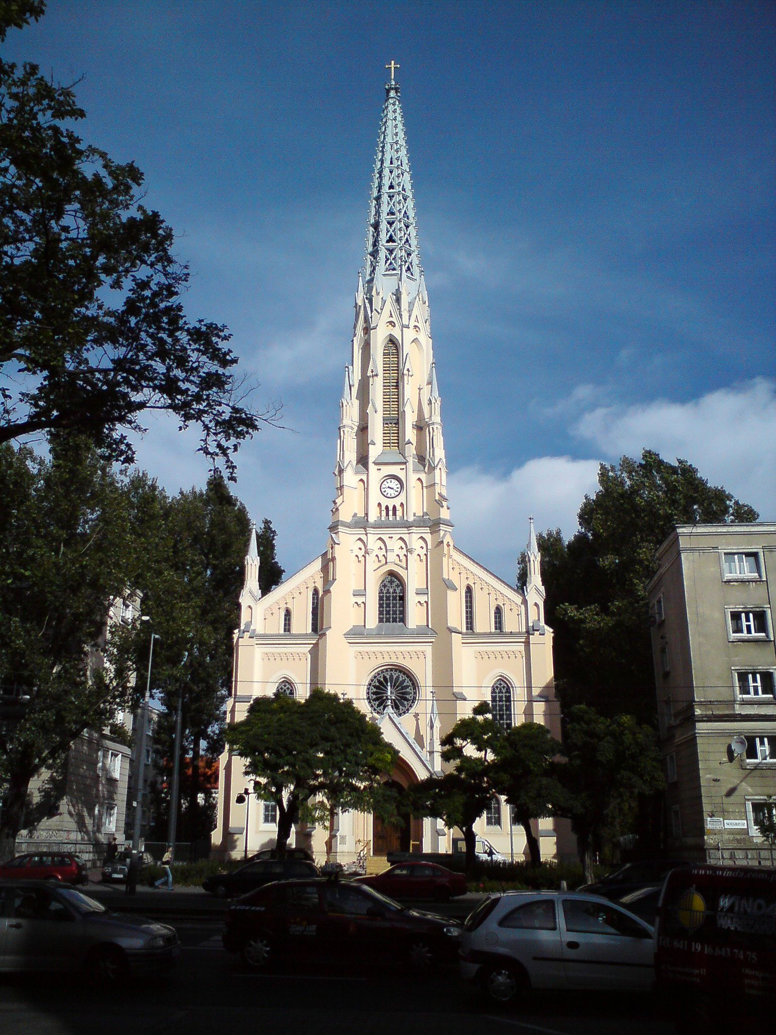 Parafia Ewangelicko-Reformowana w Warszawie na Lesznie